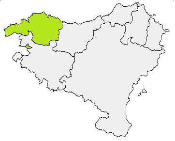 Bizkaiako mapa Euskal Herrian.